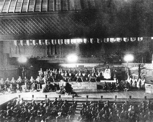 九代目市川団十郎「暫」1895 鹿島清兵衛（築地玄鹿館）